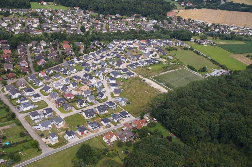 Luftbild von Greste